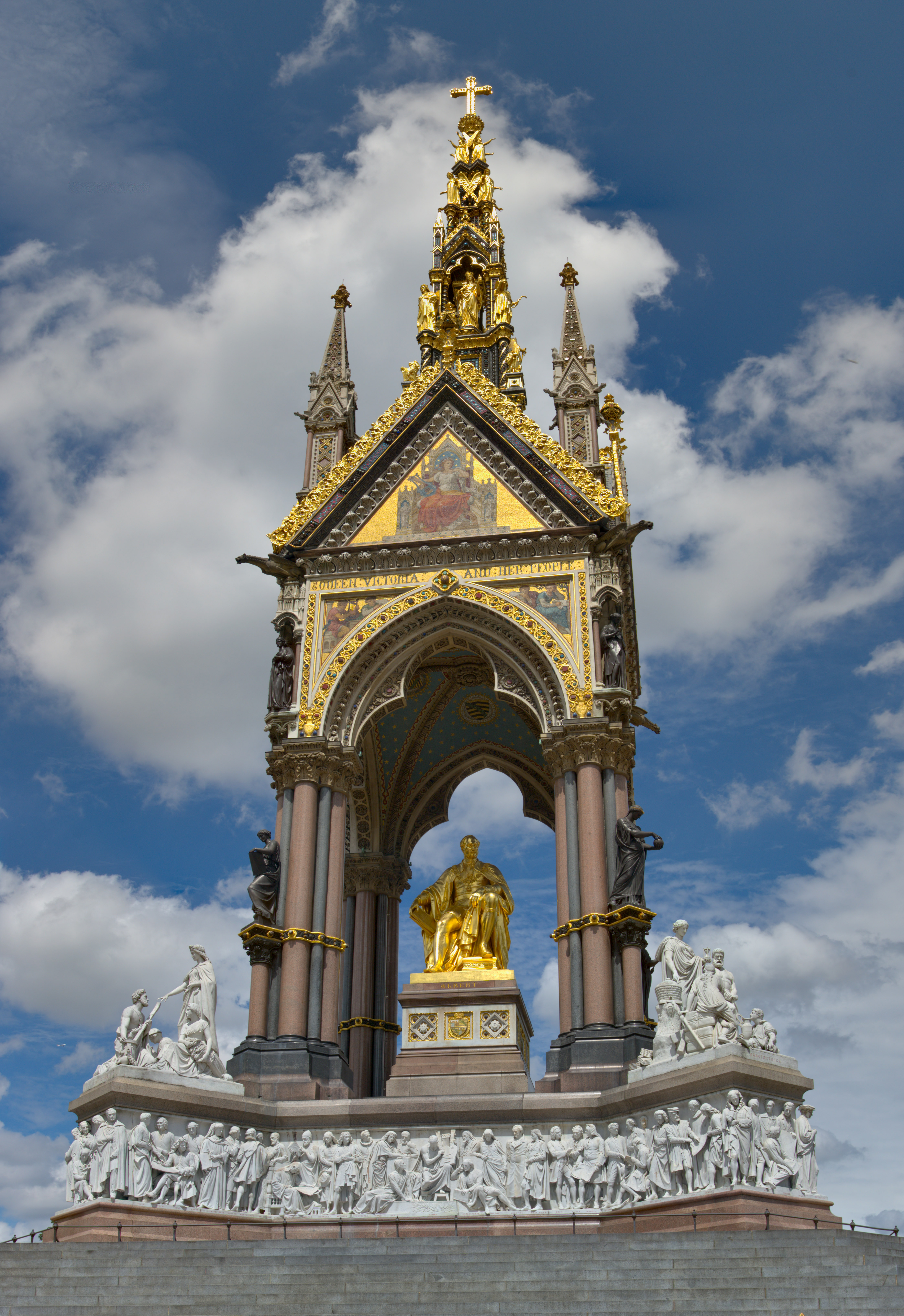 Hyde Park